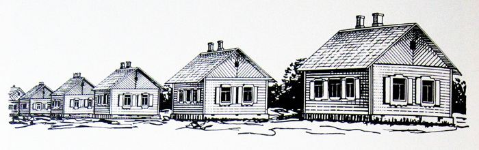 Праект пасёлка будаўнікоў у раёне Танкавай вуліцы (цяпер – вул. Максіма Танка), арх. М.Гулько, 1947 г.